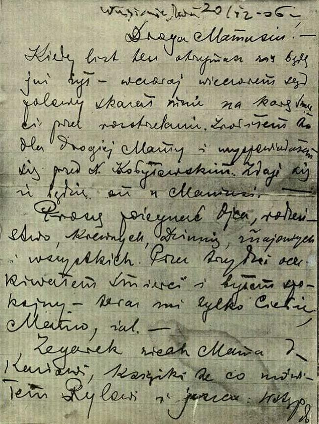 Fotokopia pierwszej strony listu Stanisława Wernera (OB PPS) z więzienia z 20 grudnia 1906 r.